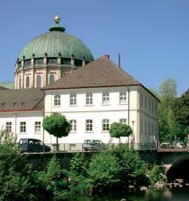 Studienhaus am Dom, St. Blasien (Schwarzwald)